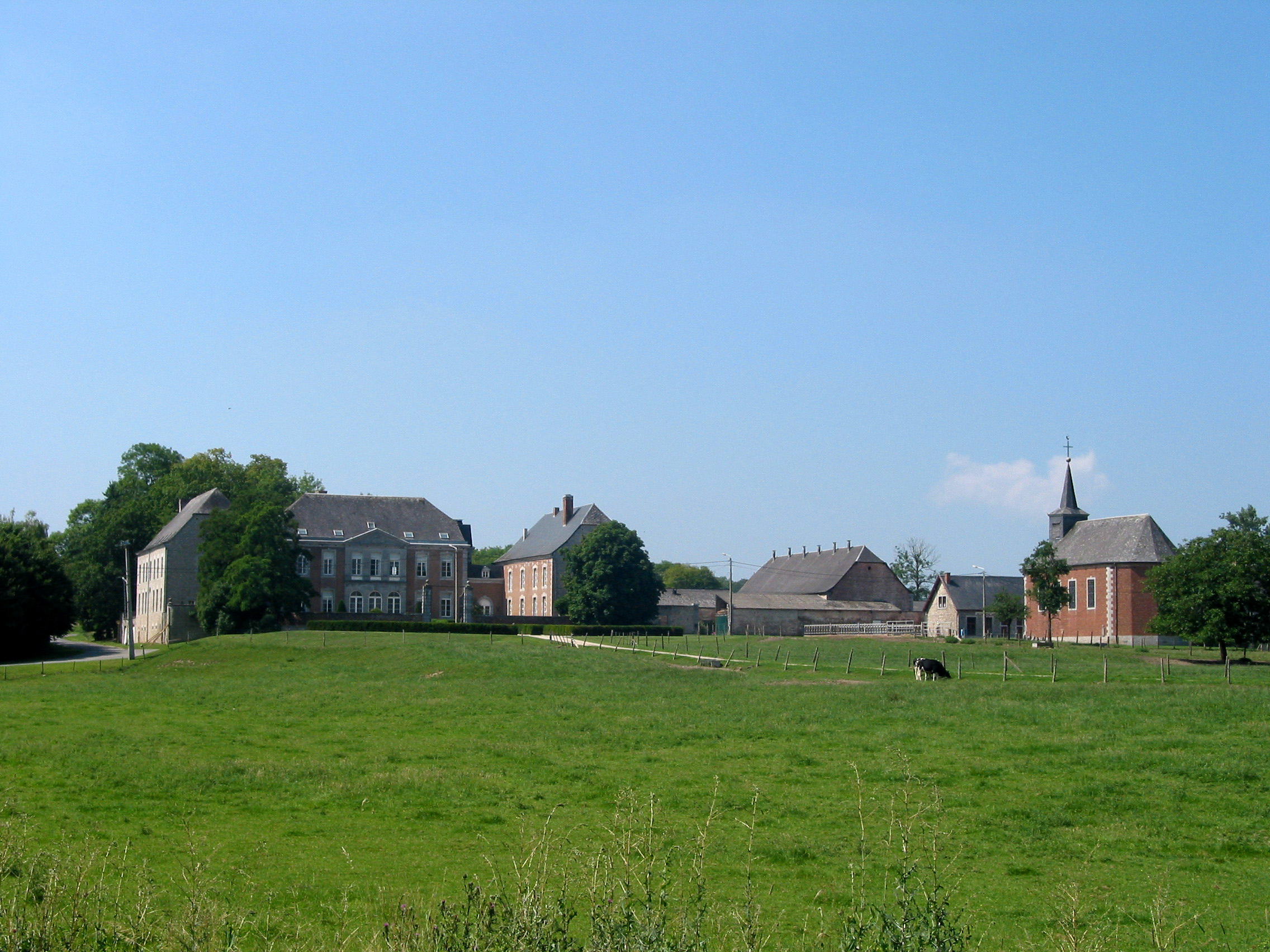 Baronville (Belgique), le quartier du château et de l'église.